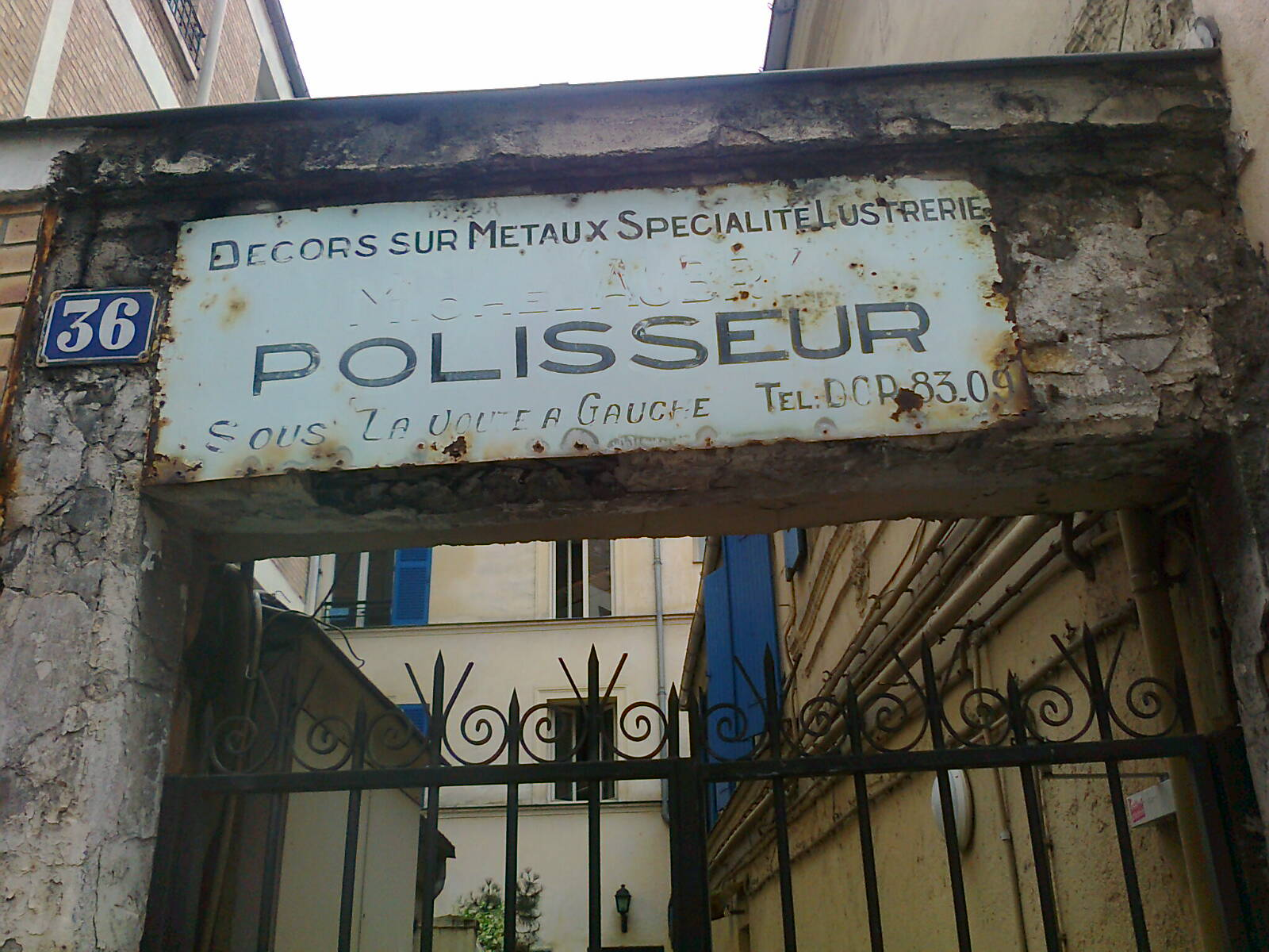 Grille d'entrée d'une cour - 36 rue de Montreuil (Paris - 11e). Numéro de téléphone : DOR(ian) 83.09.